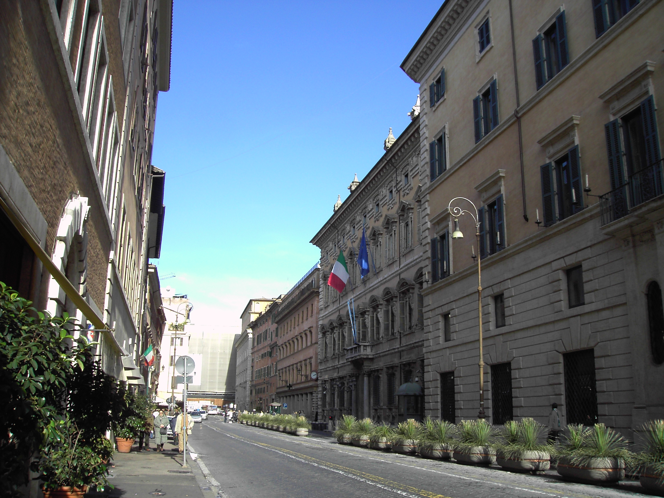 Roma, piazza e palazzo Madama